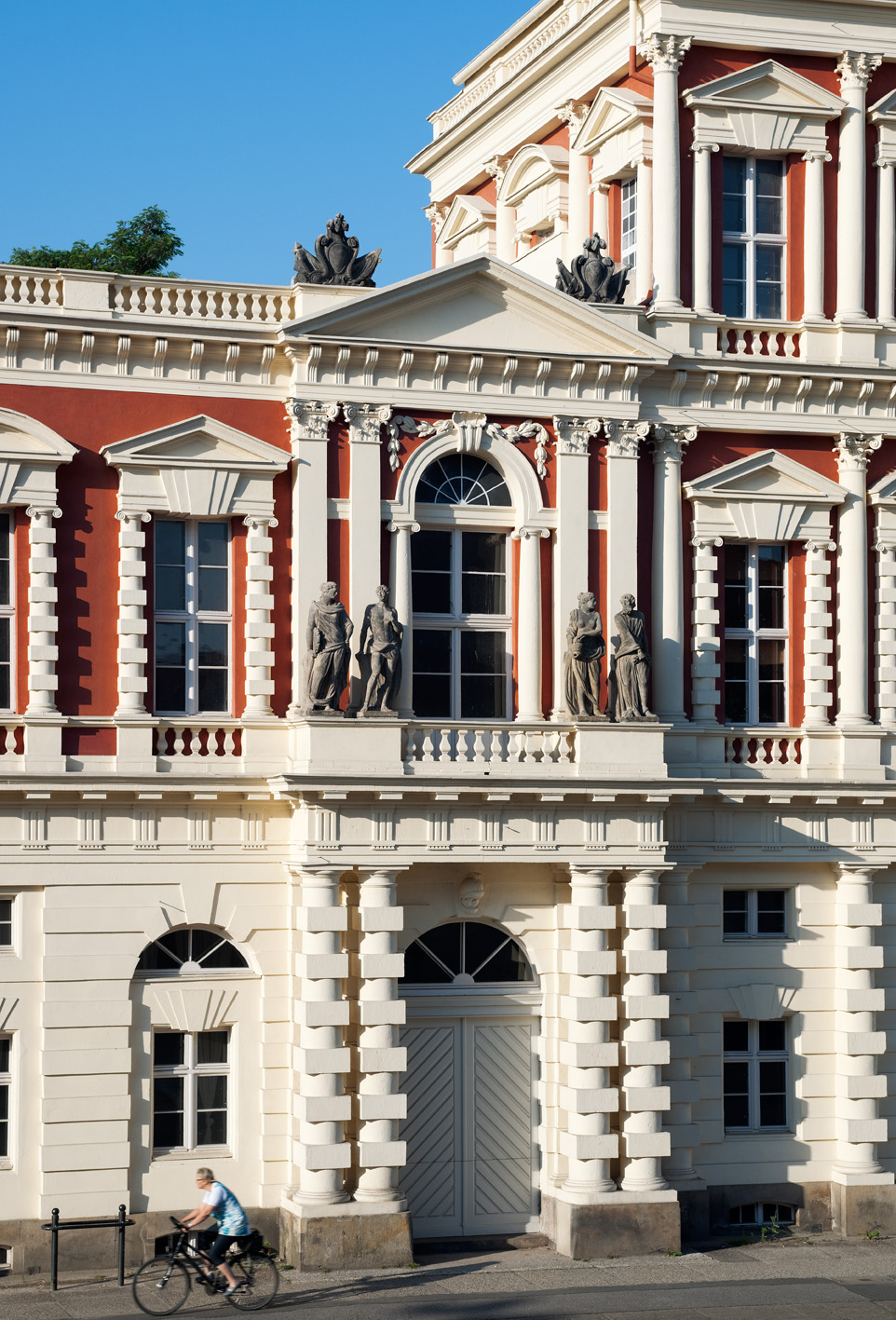 Potsdam, Breite Straße 8-12 (Hiller-Brandtsche Häuser). Portal.